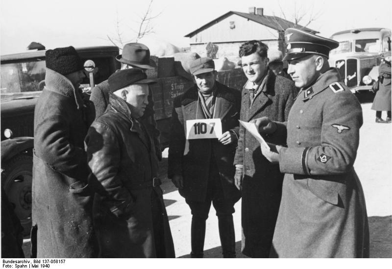 Wartheland, Umsiedler aus Ostpolen Wartheland - Ansiedlung Ansiedlung dt. Bauern aus Ostpolen Mai 1940 [Reichsgau Wartheland.- Deutschstämmige Bauern aus Ostpolen im Gespräch mit einem SS-Scharführer vom Sicherheitsdienst.]